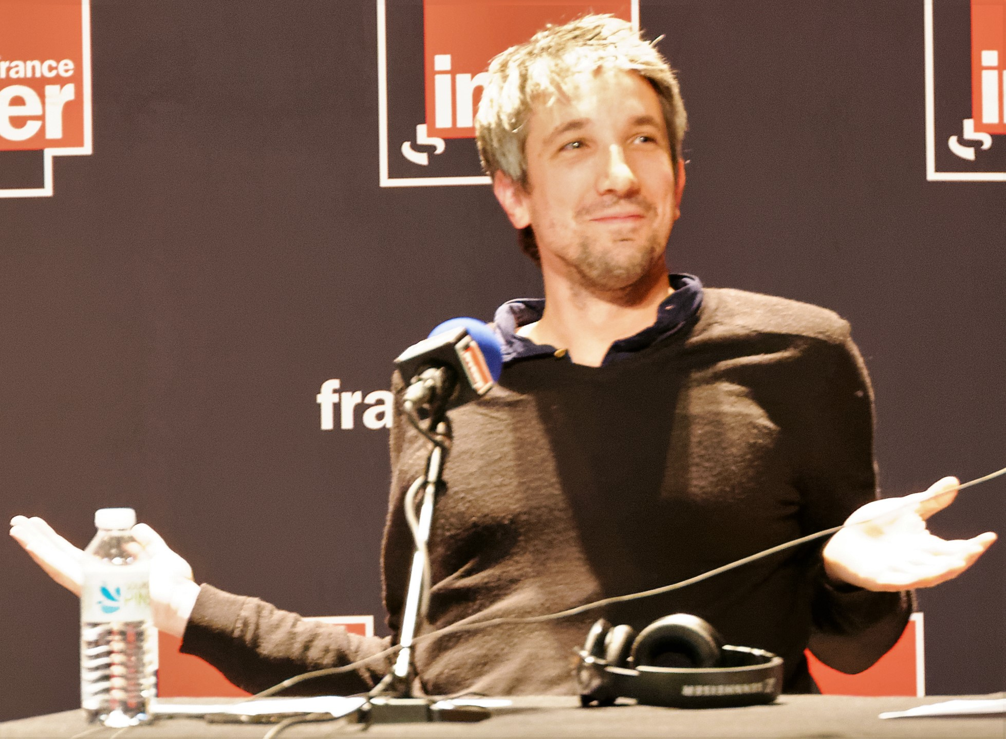 Guillaume Meurice lors de l'enregistrement public de l'émission Si tu écoutes j'annule tout lors du « Tour de France Inter » à Dijon, le vendredi 22 janvier 2016 au Grand Théâtre de Dijon (Côte d'Or, Bourgogne-Franche Comté, France).